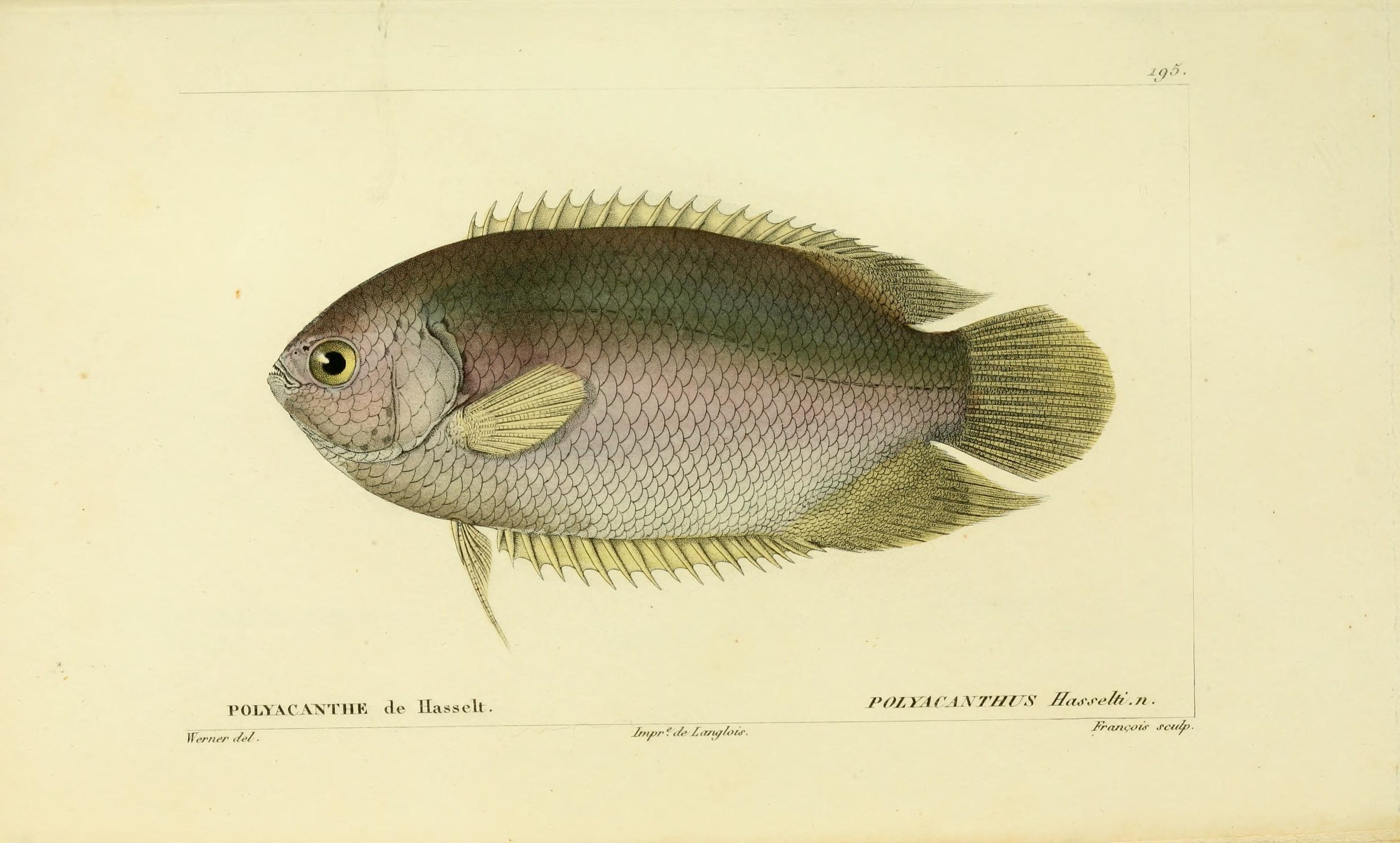 t '.!S 3 I ni